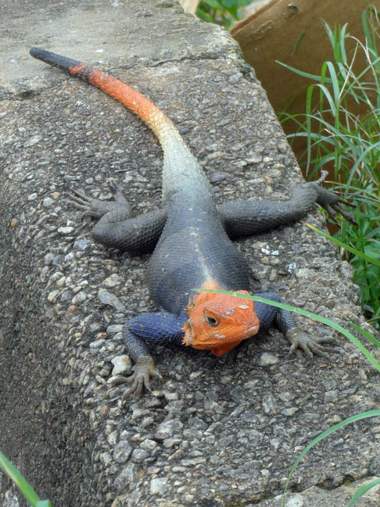 Lézard du Cameroun (Agama africana), dans le département du Nyong-et-Kéllé (région du Centre)